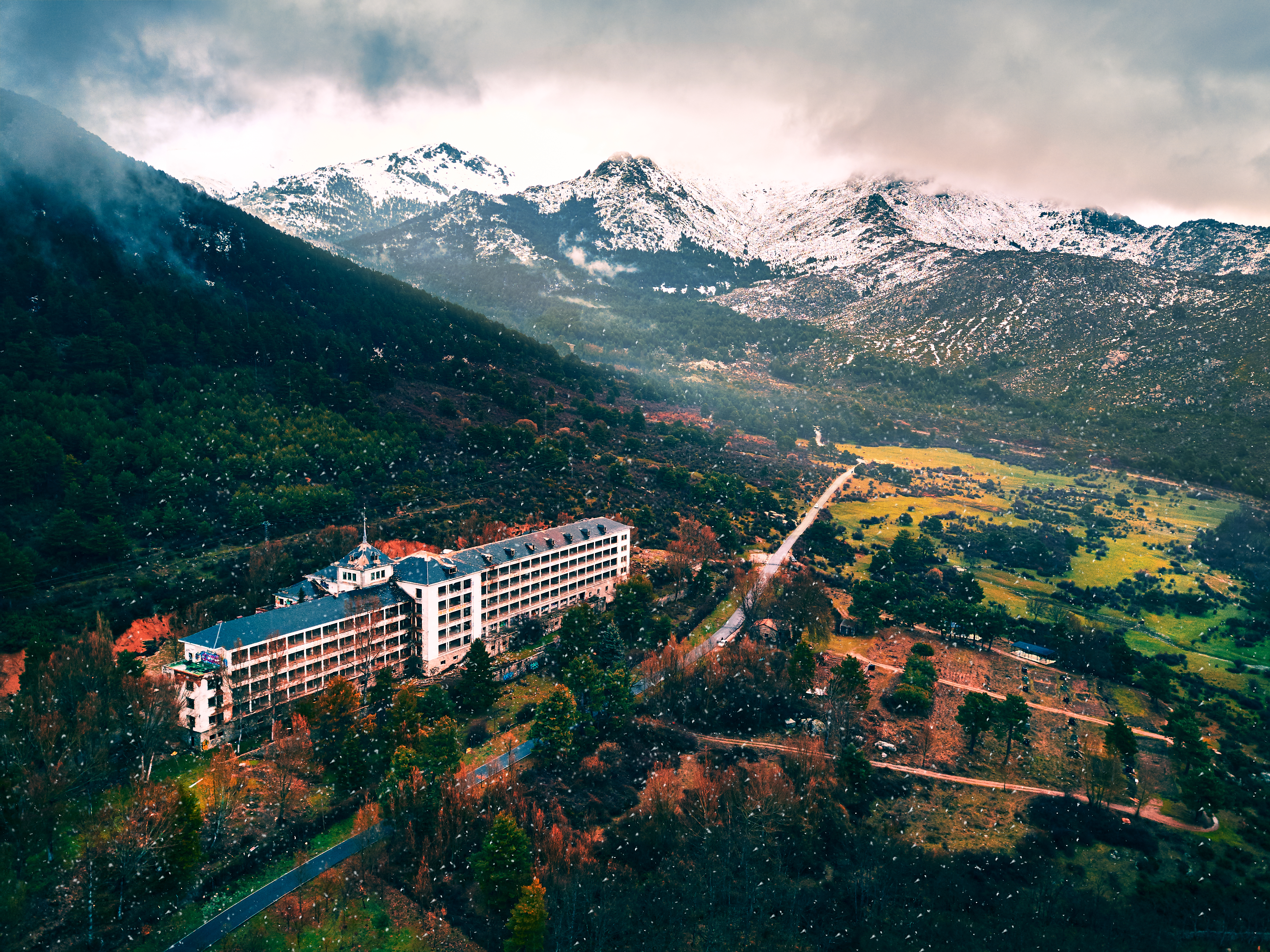 Navacerrada, España.